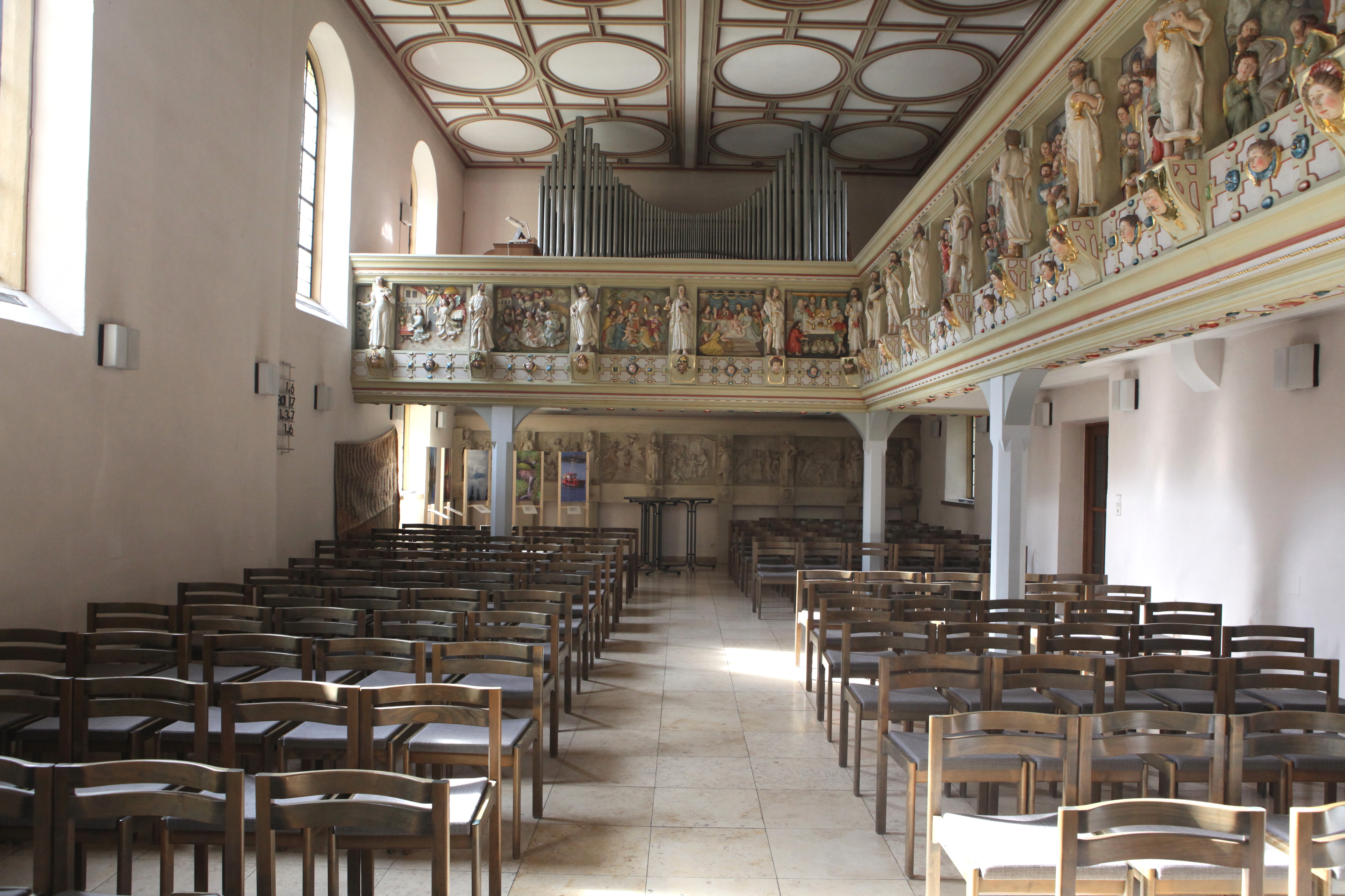 Evangelische Pfarrkirche St. Johannis in Rödental, OT Oeslau, Landkreis Coburg